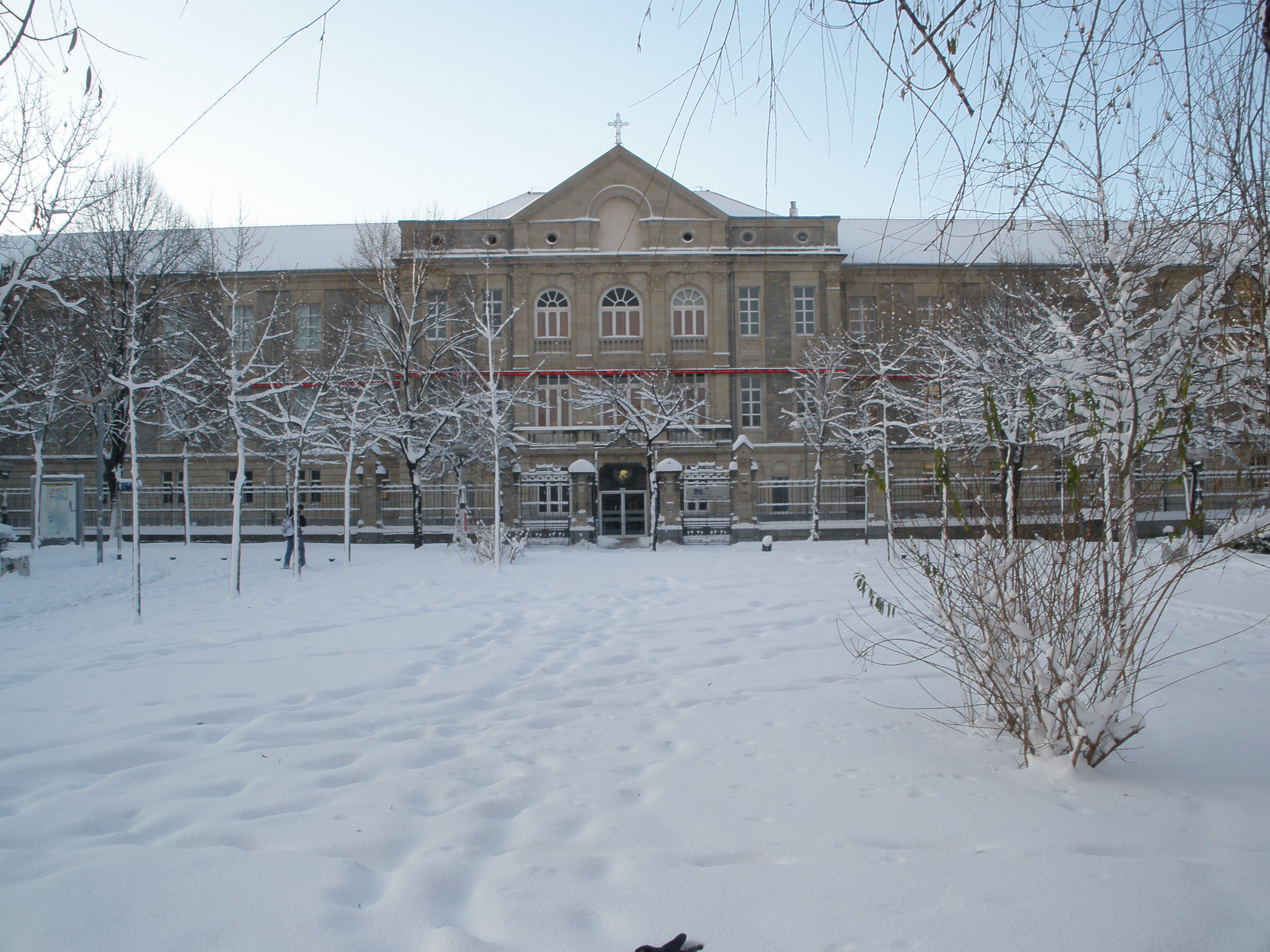 Biblioteca de la UPV del campus de Alava